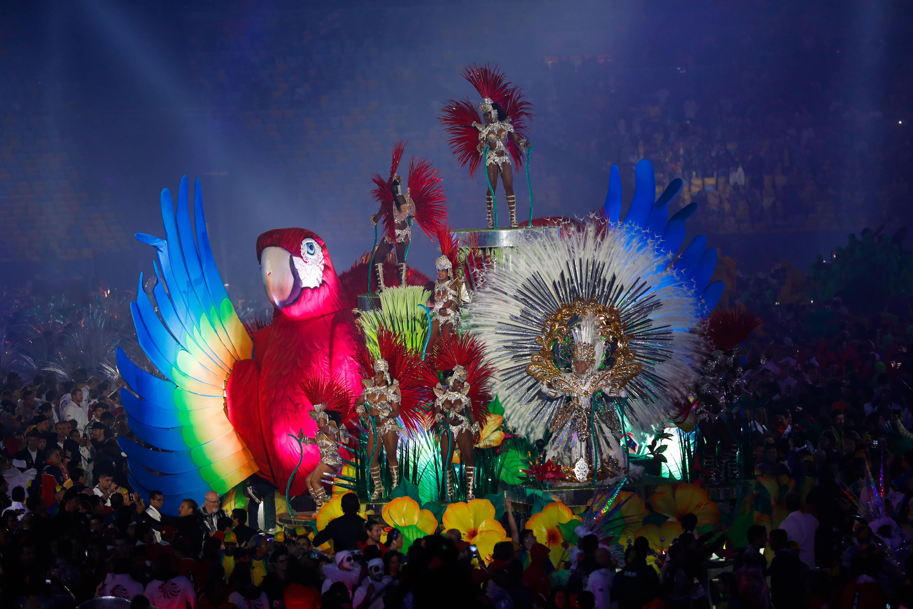 Rio de Janeiro - Cerimônia de encerramento dos Jogos Olímpicos Rio 2016, no Maracanã ( Fernando Frazão/Agência Brasil)